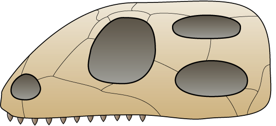 Skull of Diapsida